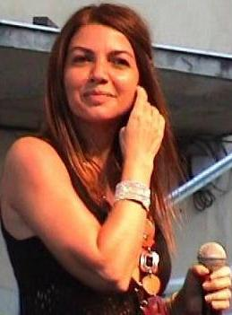 Cristina D'Avena durante uno spettacolo al Giffoni Film Festival.